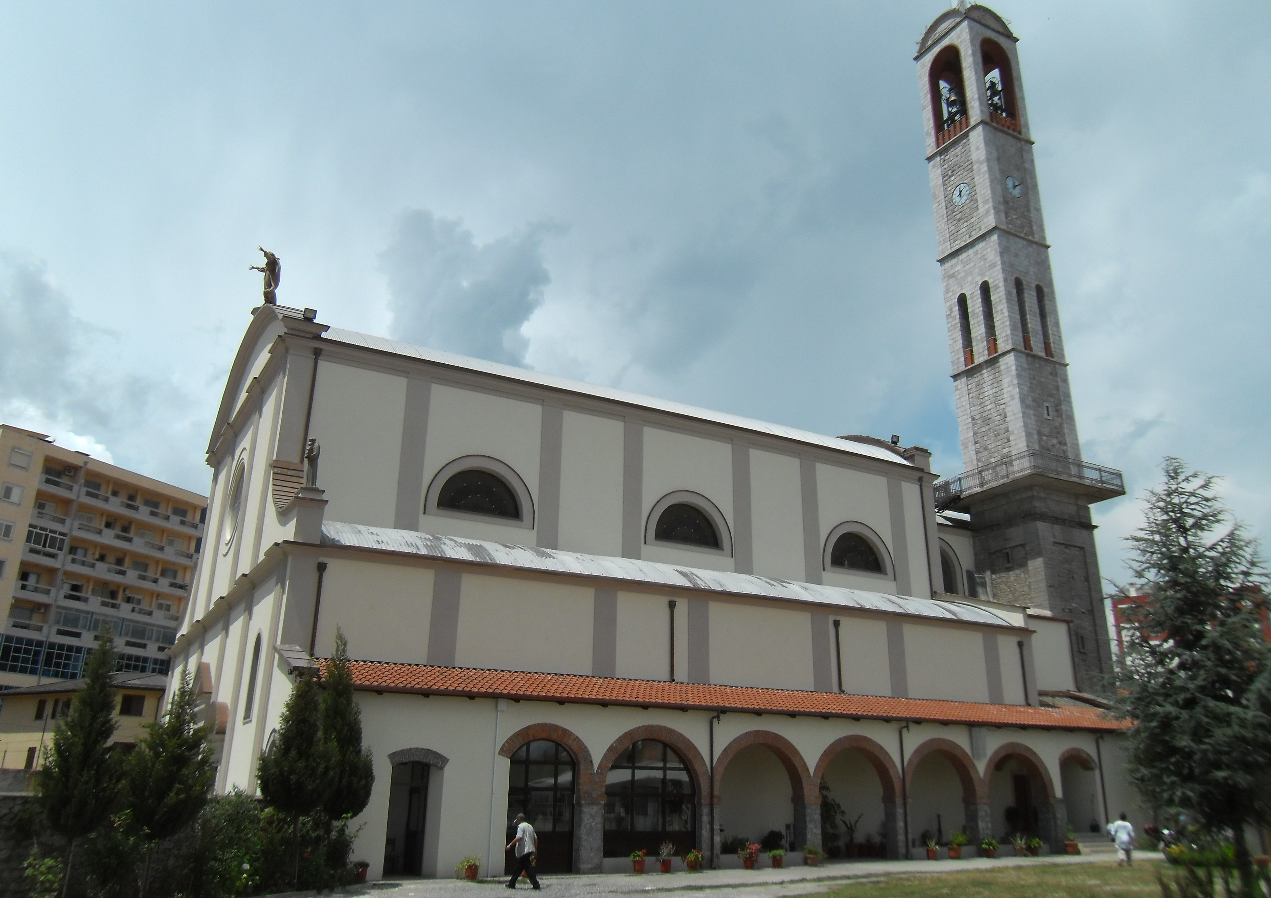 Franziskanerkirche in Shkodra